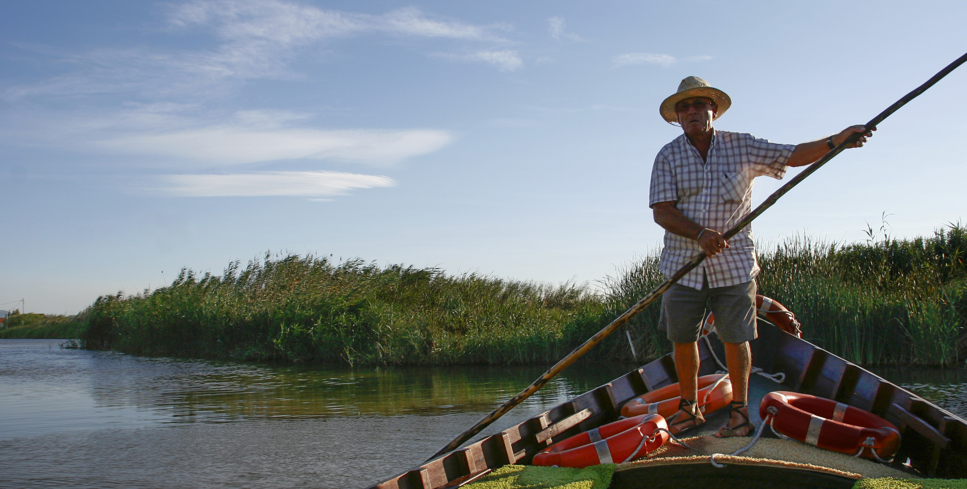 Albufera de Valencia, España